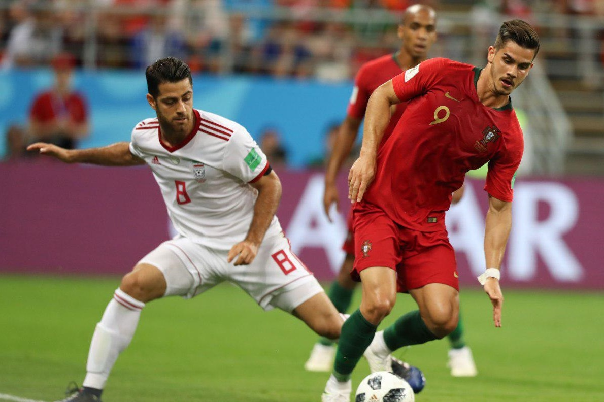 نیمه دوم بازی تیم‌های فوتبال ایران و پرتغال در جام جهانی ۲۰۱۸